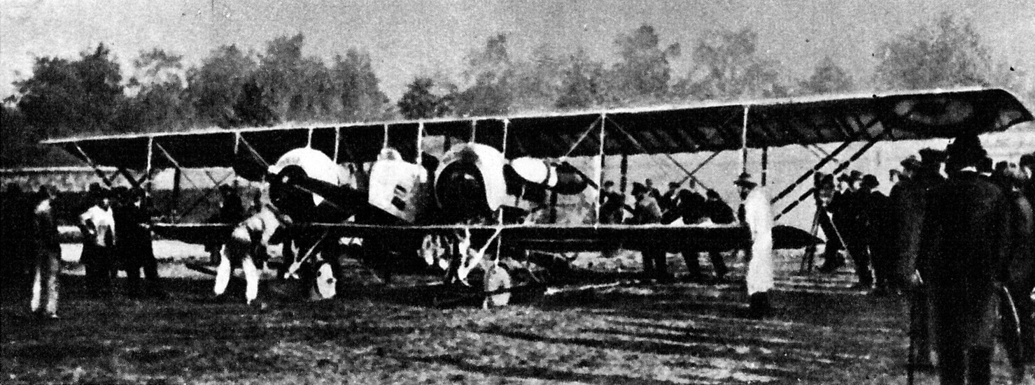 Francuski samolot bombowy Caudron G.4.